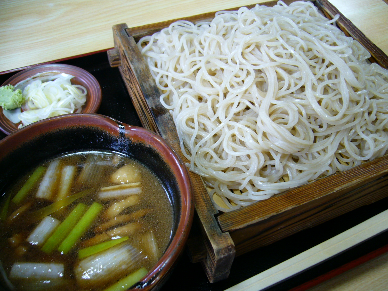 duck soup&buckwheat noodles,kamo-seiro,katori-city,japan